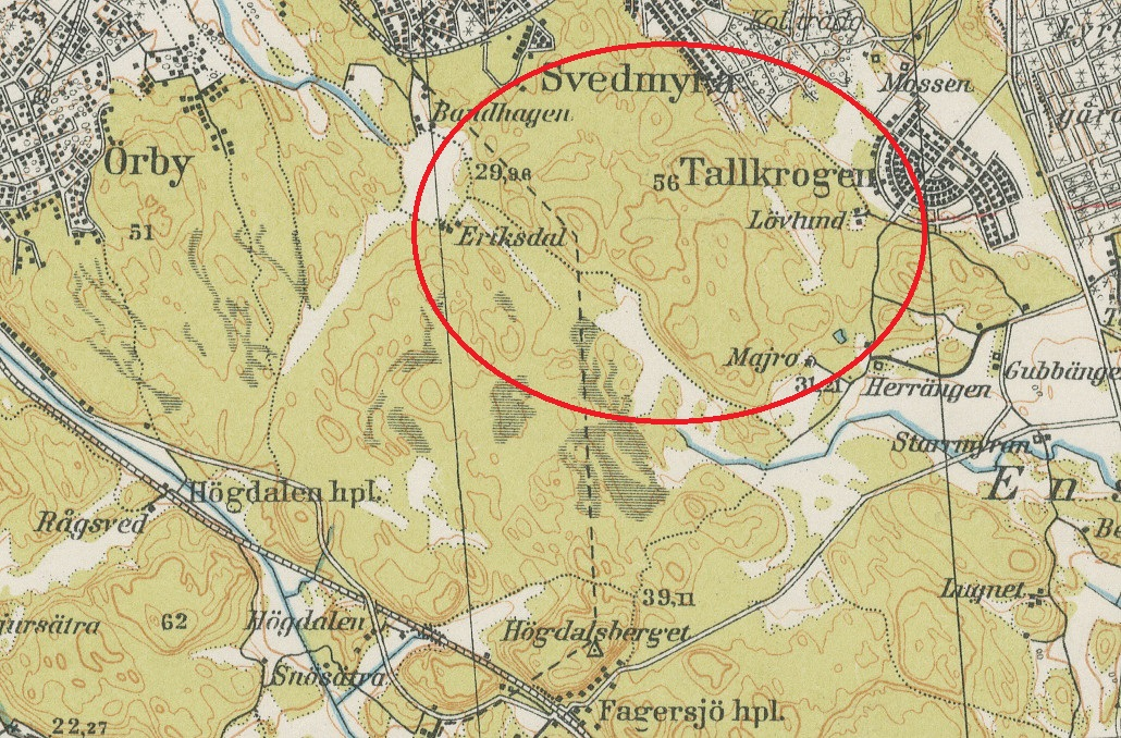 Dagens Majroskogen på en karta från 1930-talet